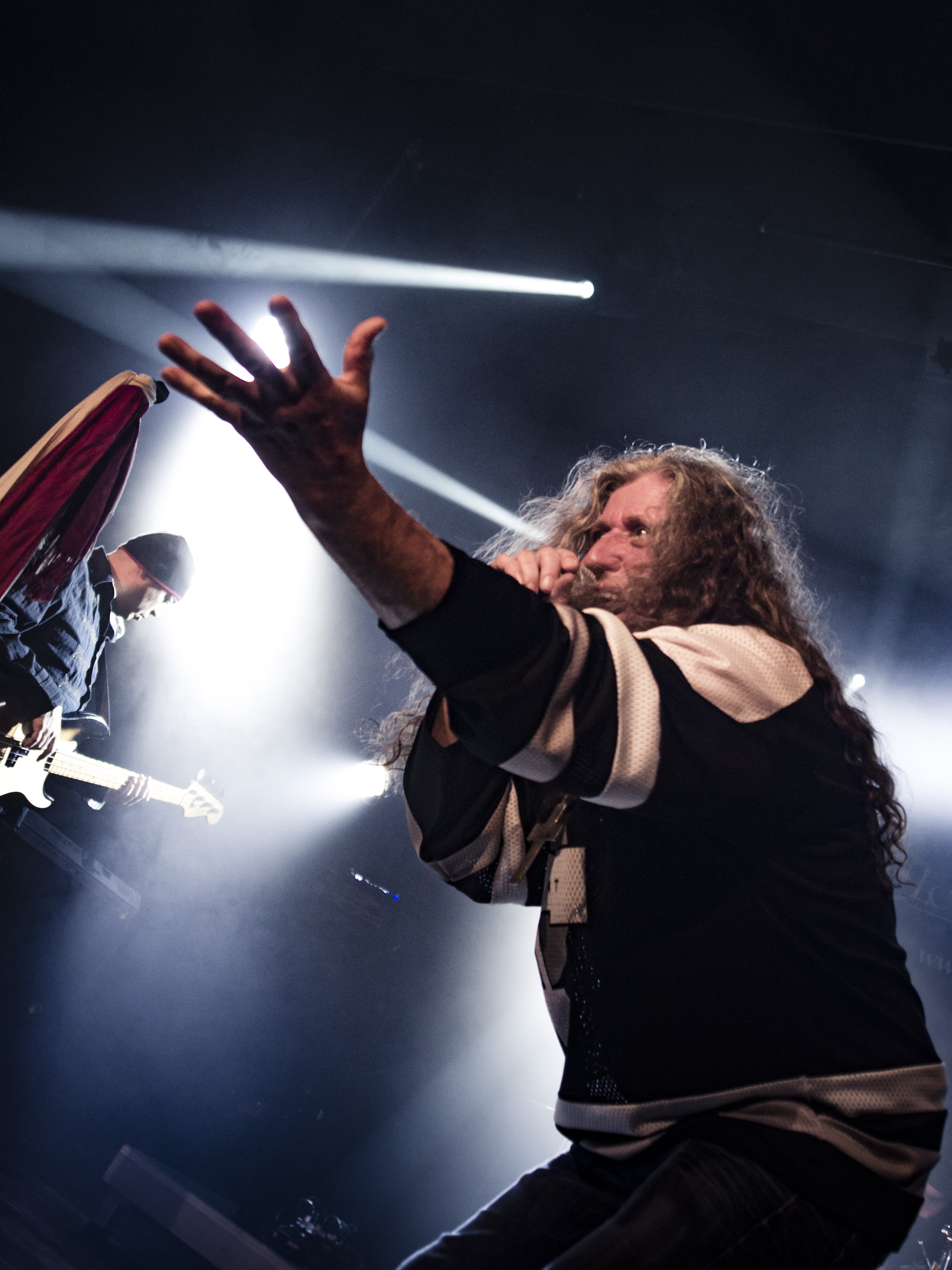 Whitecross au Elements of Rock festival 2017